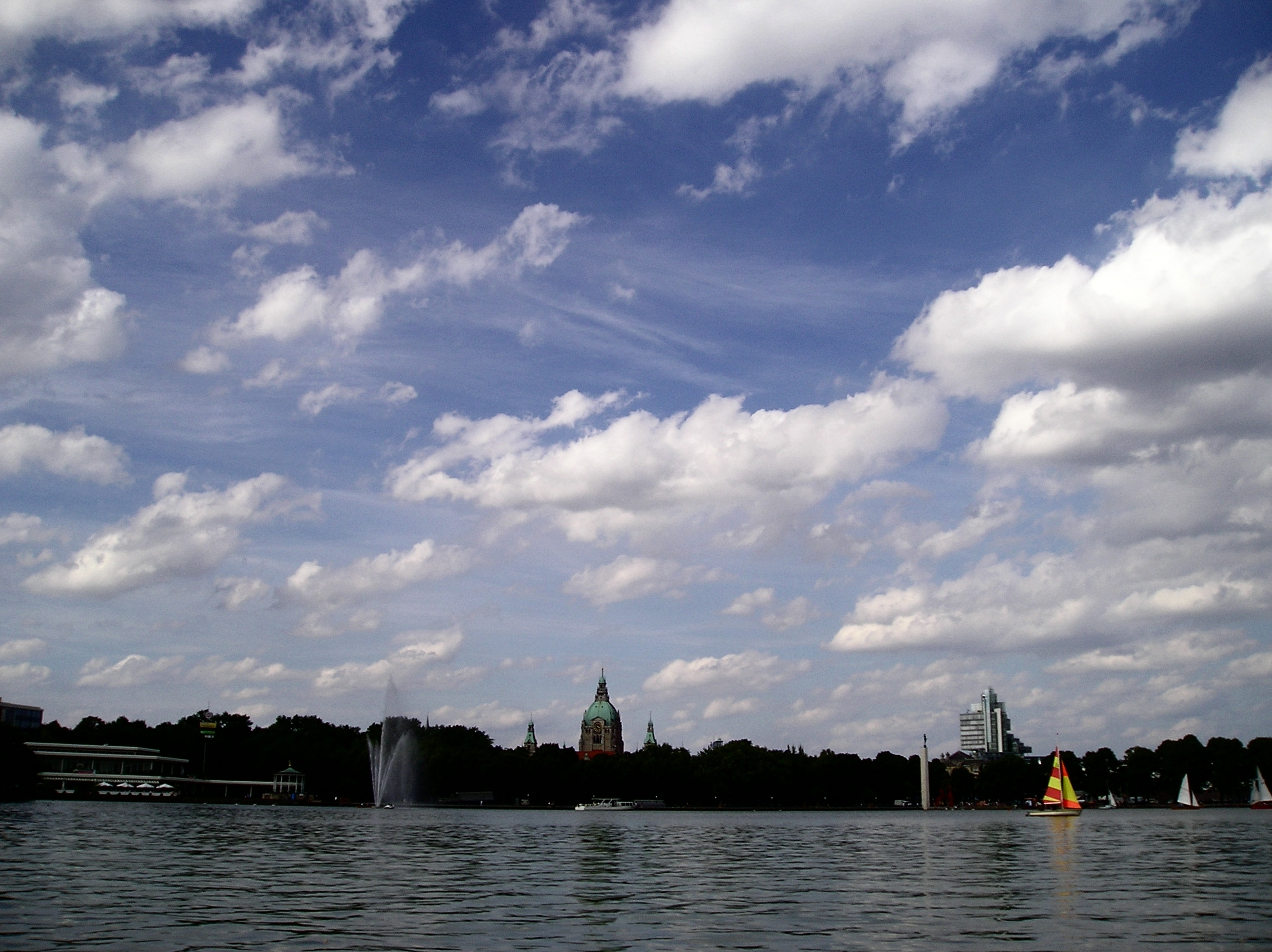 Maschsse Hannover, Blick auf das Nordufer Description: Germany Niedersachsen Hannover Mitte Maschsee Date: 18.08.2004 16:21:04 Source: Eigenes Foto; Own Foto